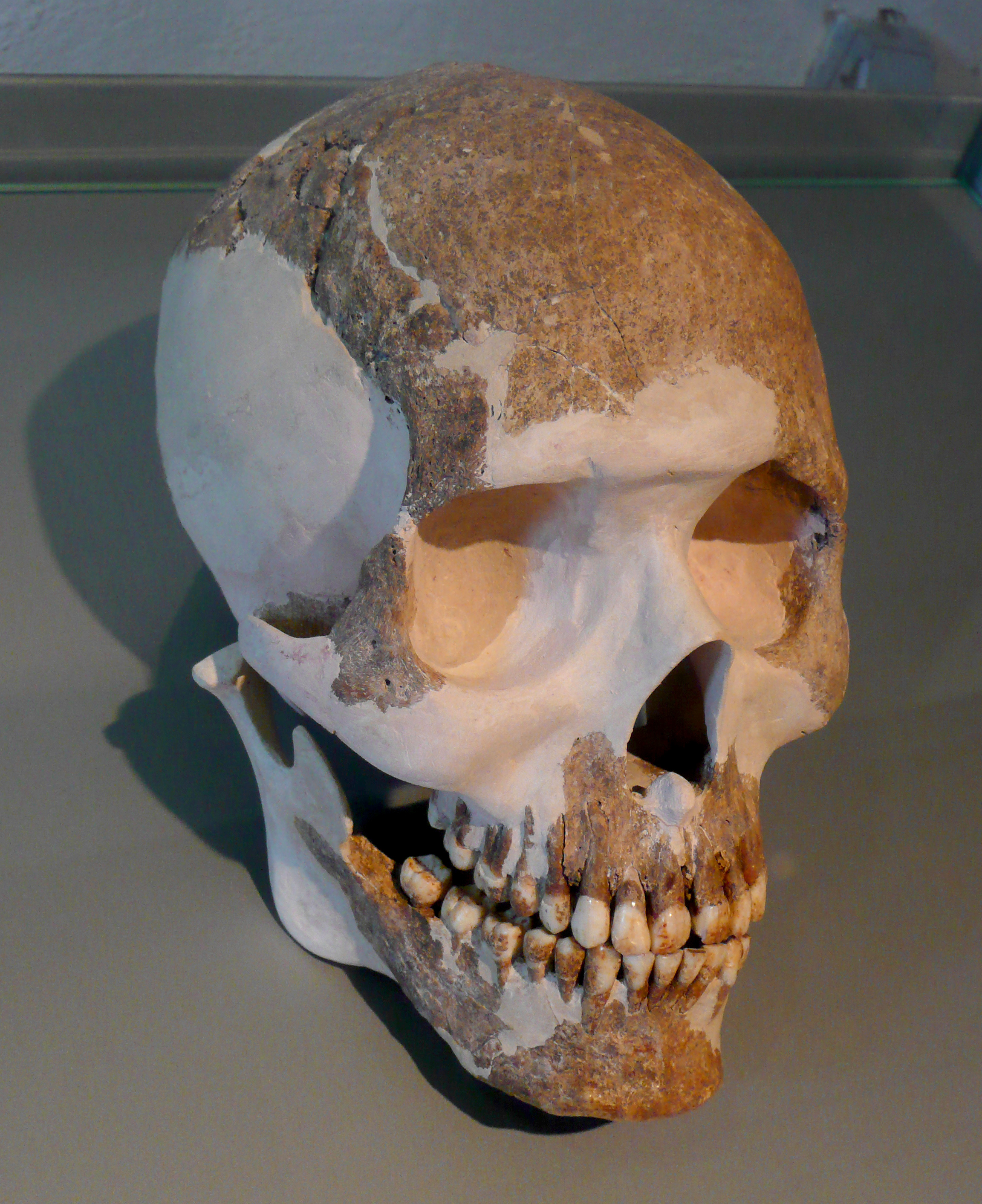 Schädel (rekonstruierte Teile heller) des Kriegers von Kemathen im Römer und Bajuwaren Museum auf der Burg Kipfenberg im oberbayerischen Landkreis Eichstätt.